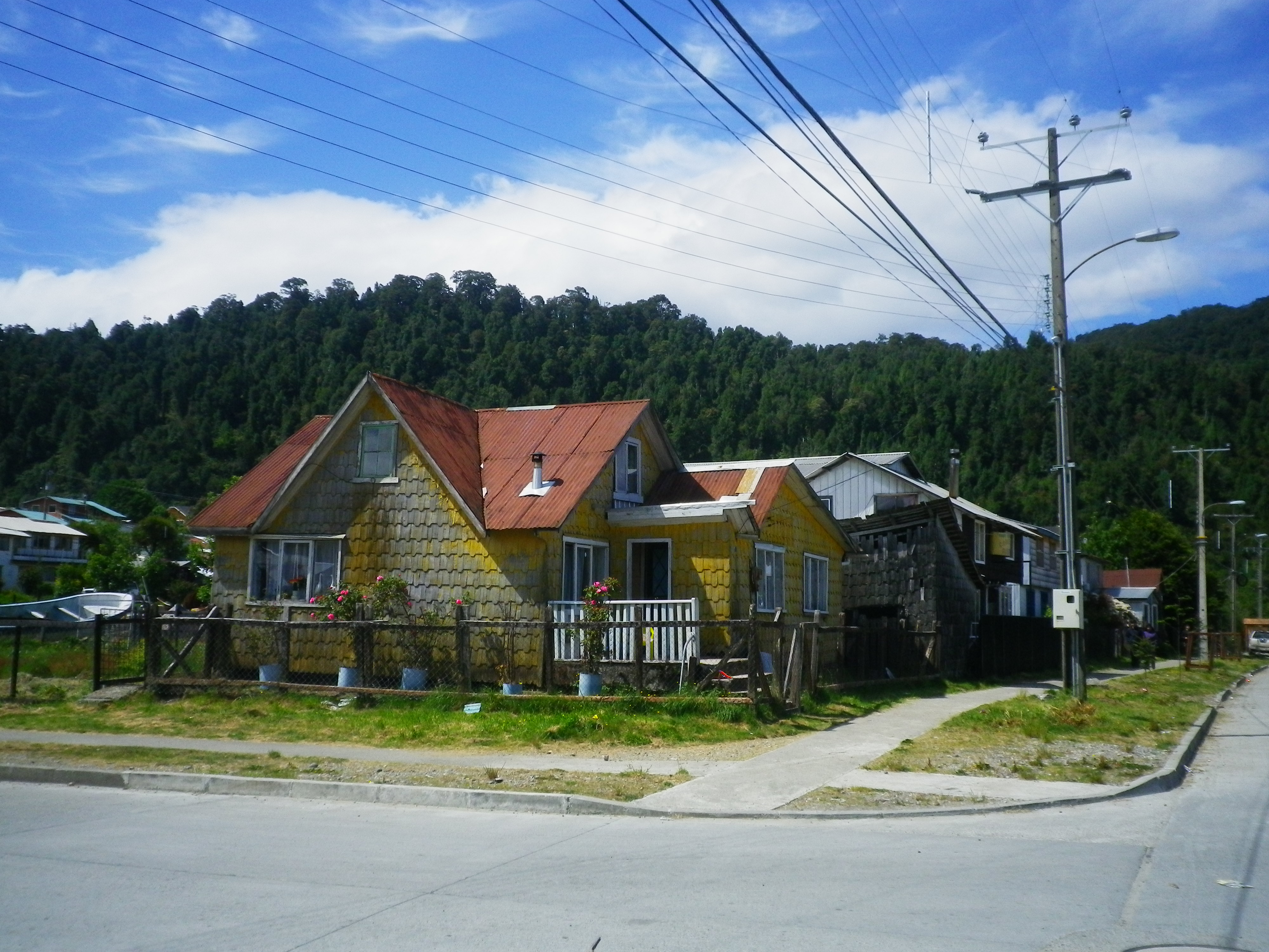 Poblado ubicado en la desembocadura del rìo Cisnès en el fiordo Puyuhuapi, Regiòn de Aysèn, Patagonia chilena Pentax Optio H90